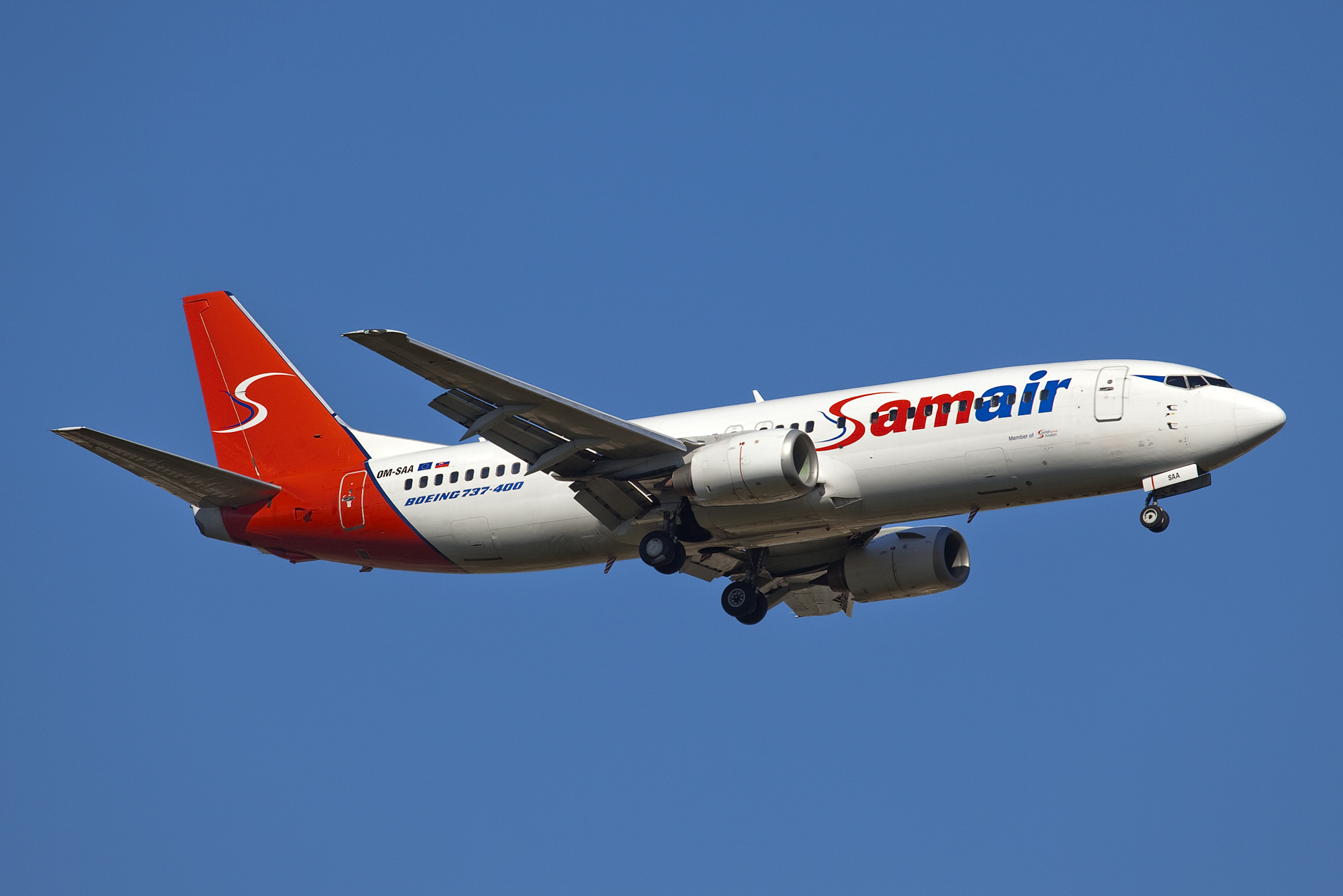 Antalya